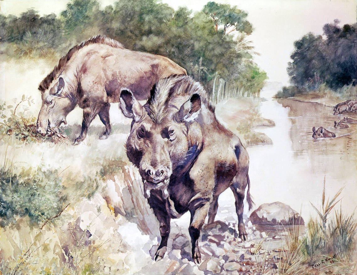 Entelodon